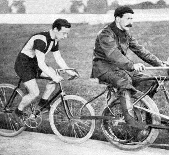 Le stayer Tommy Hall, ici en 1903 (double recordman de l'heure derrière entraîneur la même année).